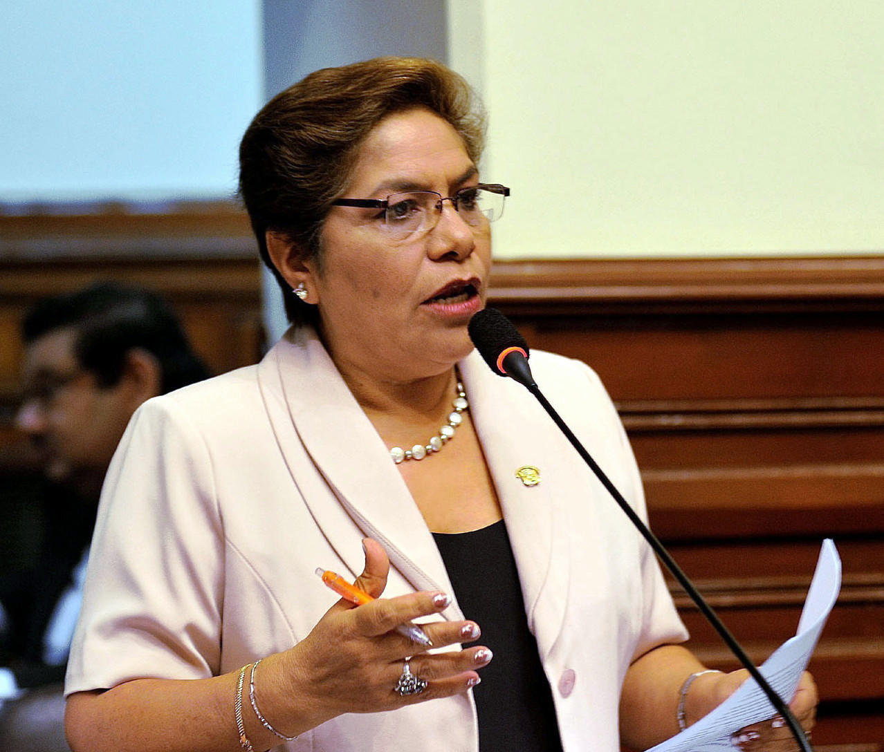 La legisladora Luz Salgado Rubianes, durante su intervención en el debate parlamentario realizado esta mañana por el Pleno congresal.